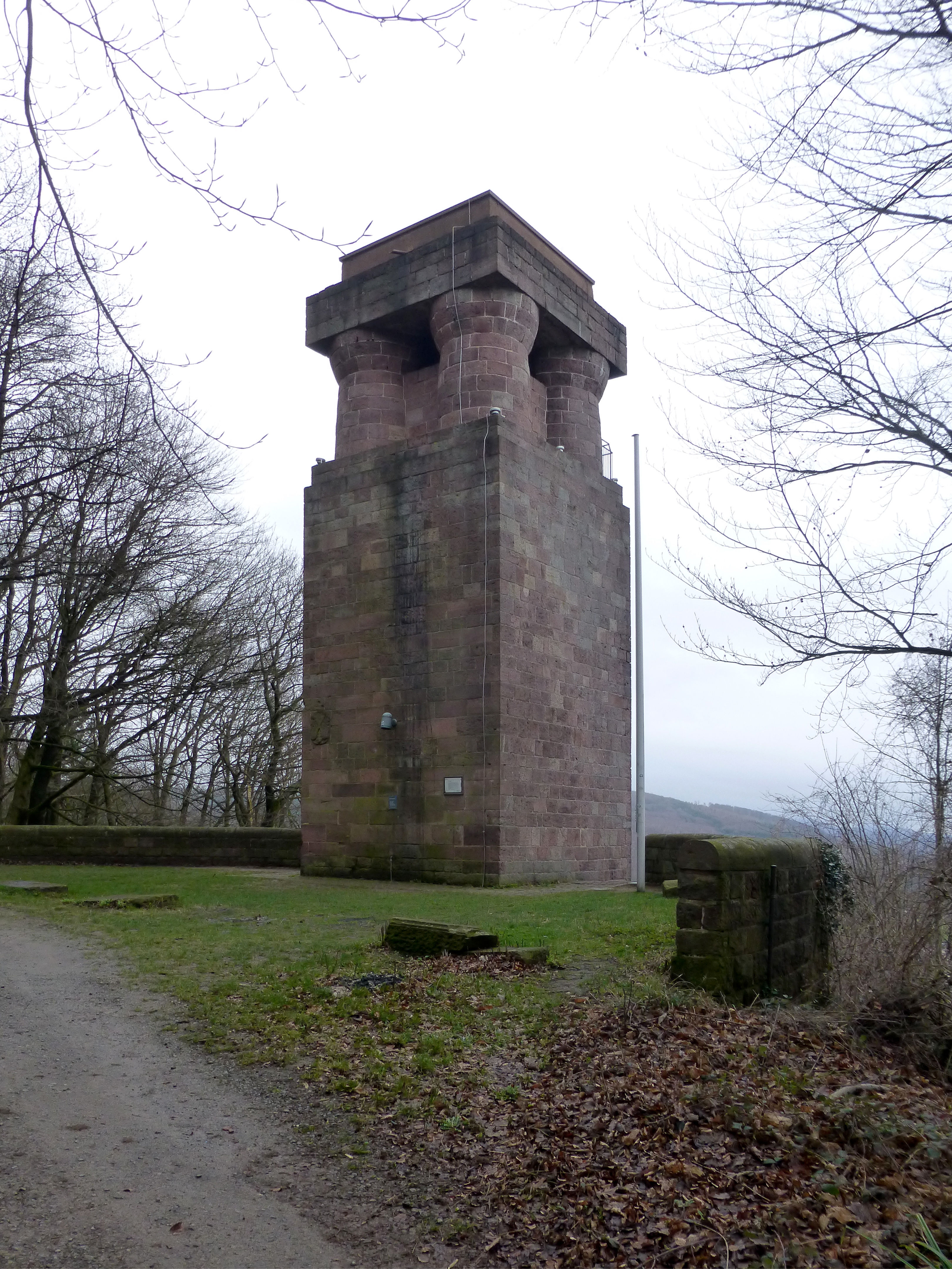 Bismarckturm oberhalb von Ettlingen